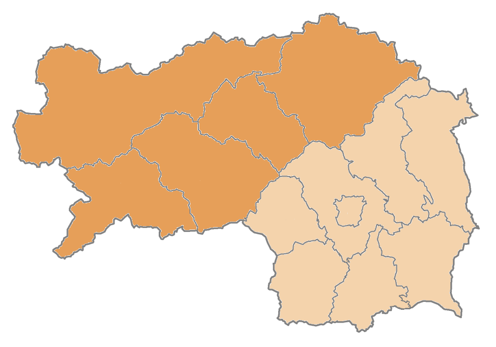 Karte: politischer Obersteiermark